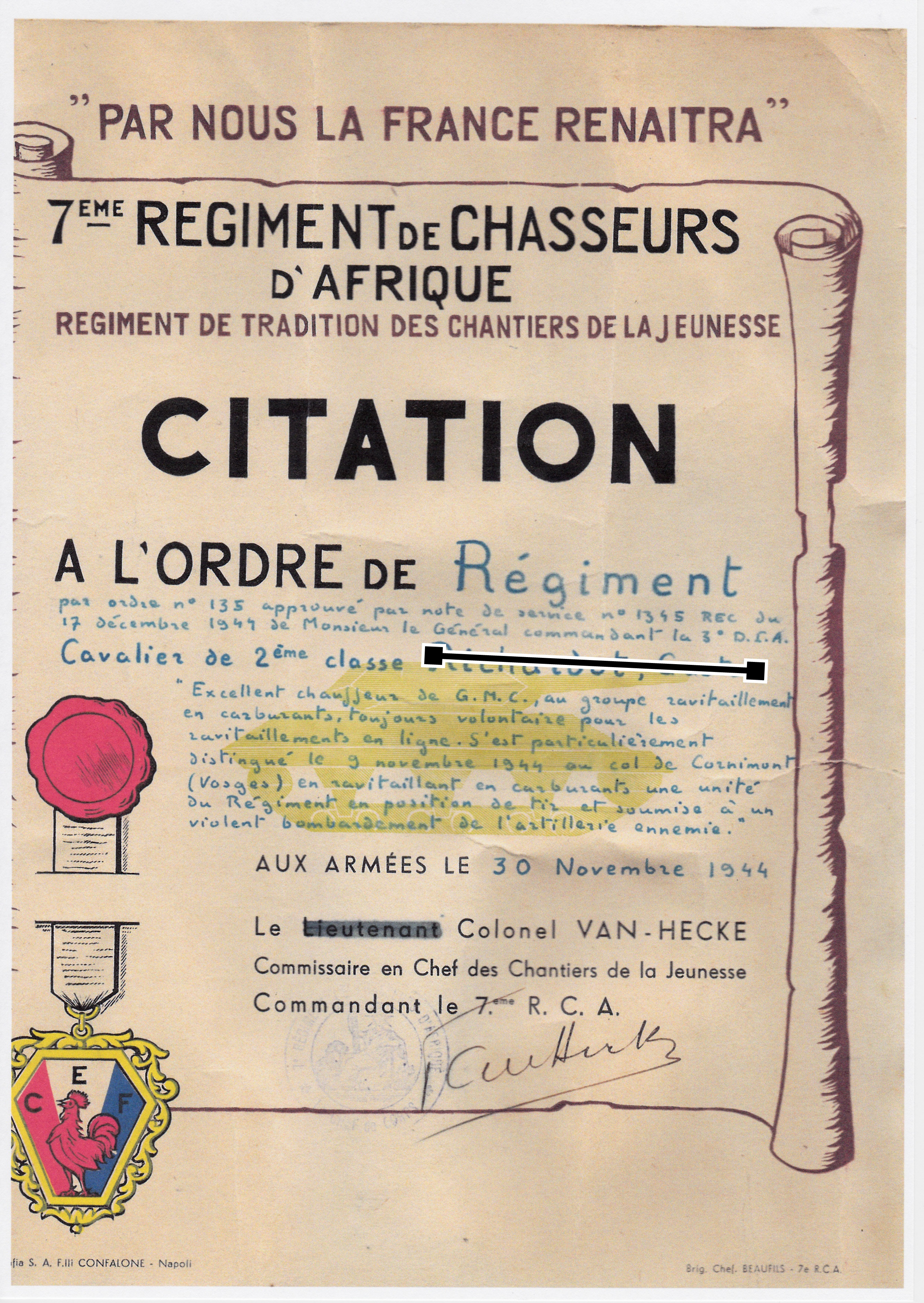 Citation à l'ordre du régiment d'un soldat distingué par son volontariat au Col de Cornimont (Vosges) le 9 novembre 1944. A ravitaillé les chars en carburant sous le feu des canons allemands.